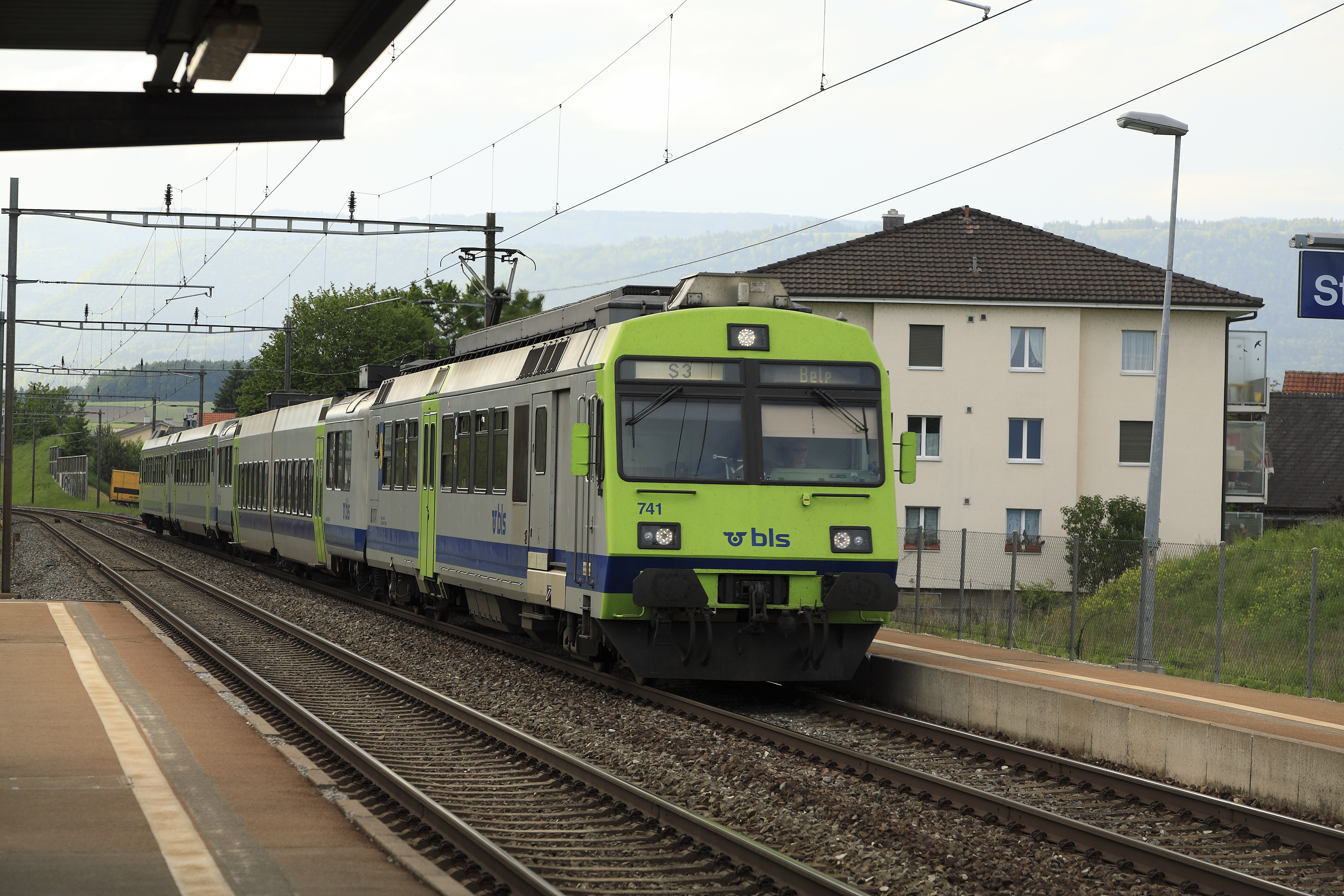 Zug der Berner S-Bahn-Linie S2 Biel-Belp, die BLS hat von den »Privatbahn-NPZ« sowohl Trieb- als auch Mittel- und Steuerwagen beschafft. Sie sind an den markanten eckigen Dachkanten gut erkennbar. Der zweite Wagen ist ein B Jumbo-Niederflurwagen, gebaut aus Teilen von Einheitswagen I. Damit konnten die vorhandenen Pendelzüge mit einem stufenlos erreichbaren Niederfluranteil versehen werden.